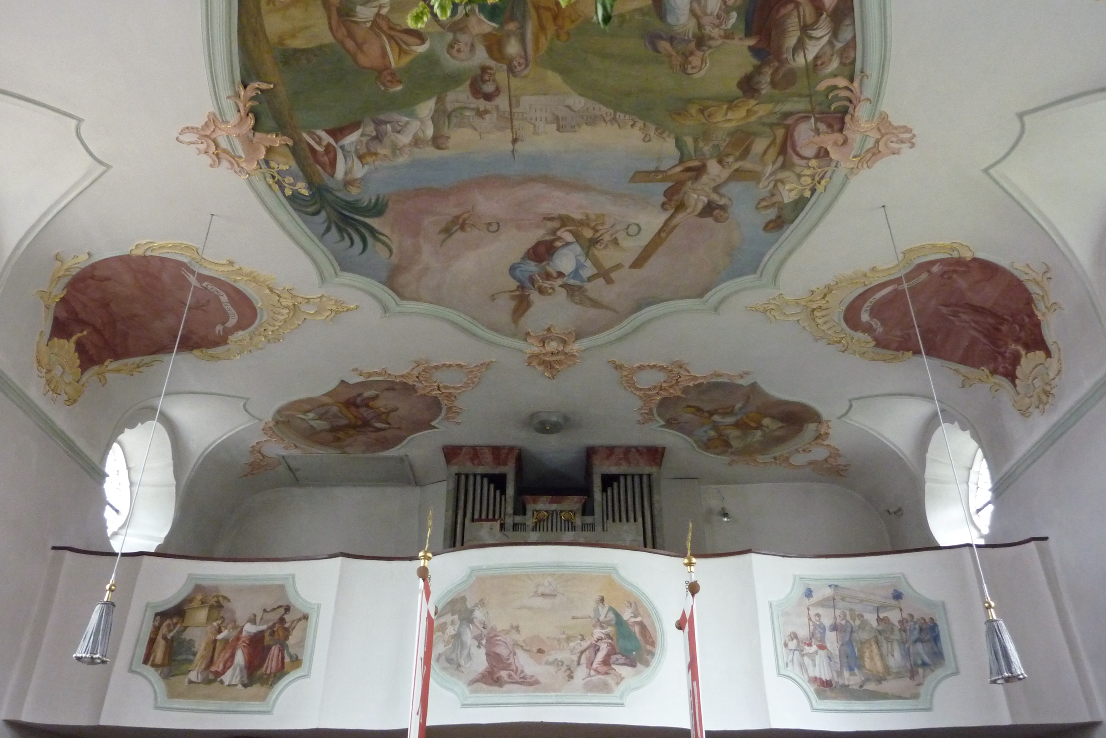 Katholische Pfarrkirche St. Peter und Paul in Sonderheim (Höchstädt an der Donau), Westempore mit Malerei (20. Jahrhundert), Deckenmalerei und Stuck aus der Zeit um 1756